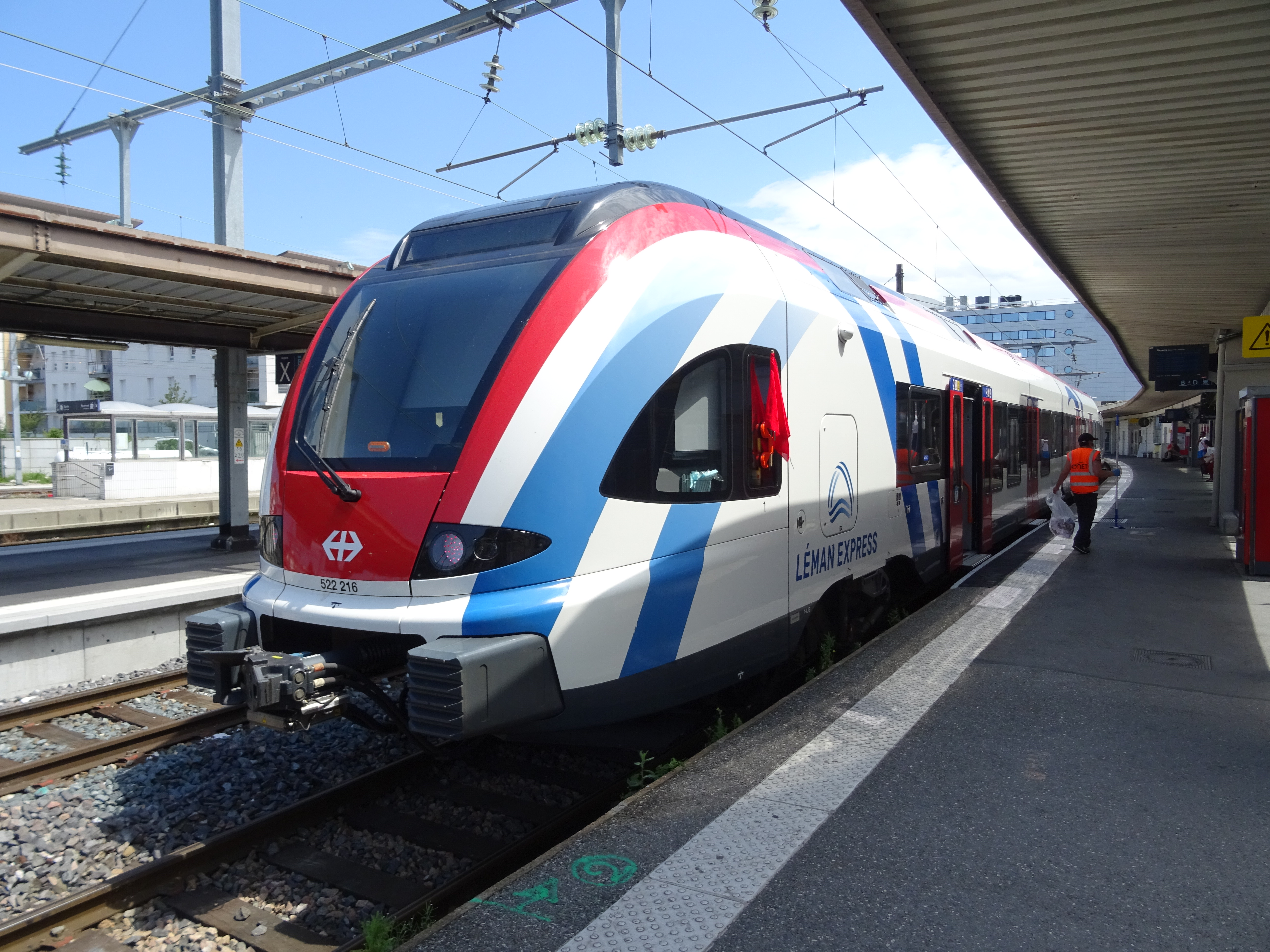 FLIRT Léman Express RABe 522 à quai voie A en gare d'Annecy.